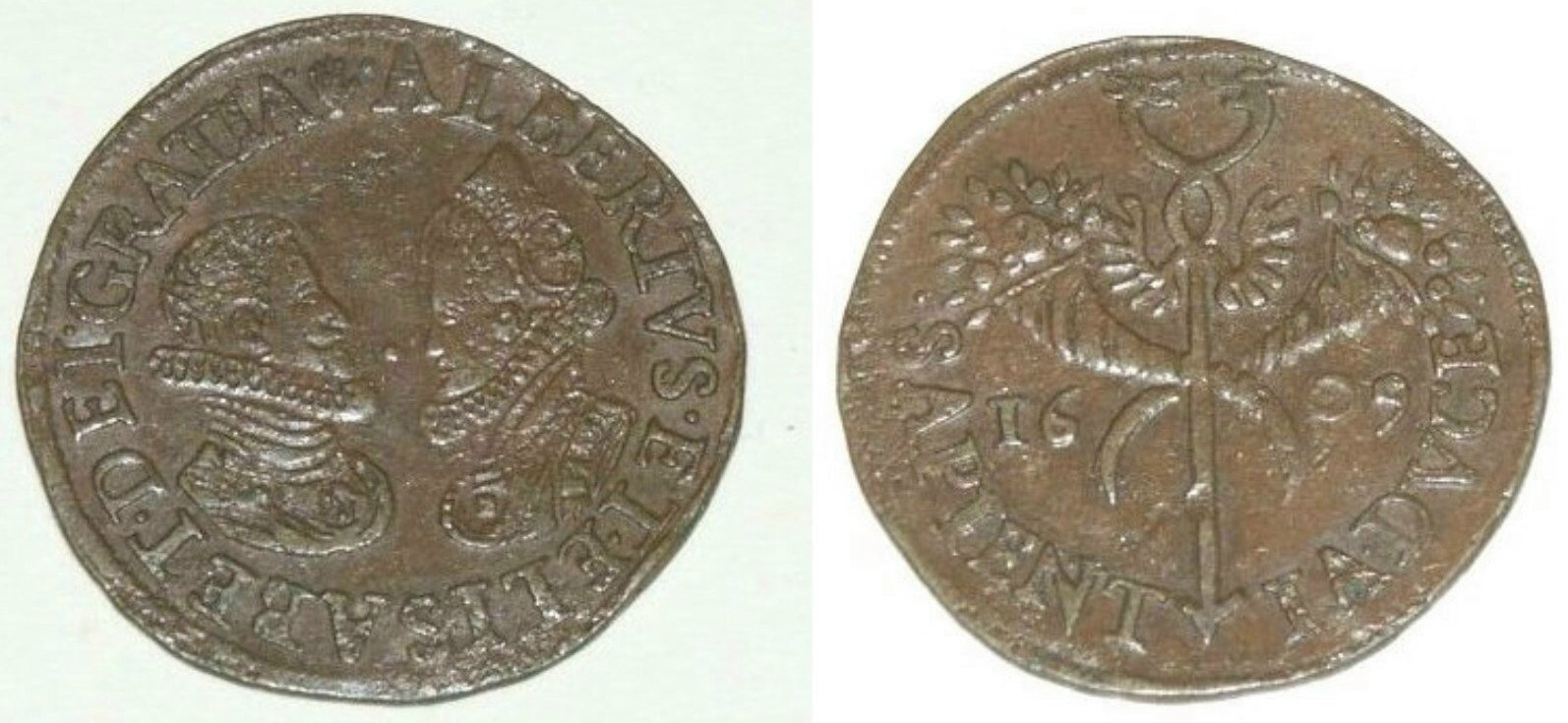 Rekenpenning Antwerpen 1609 op het 12-jarig bestand. Foto van eigen exemplaar.